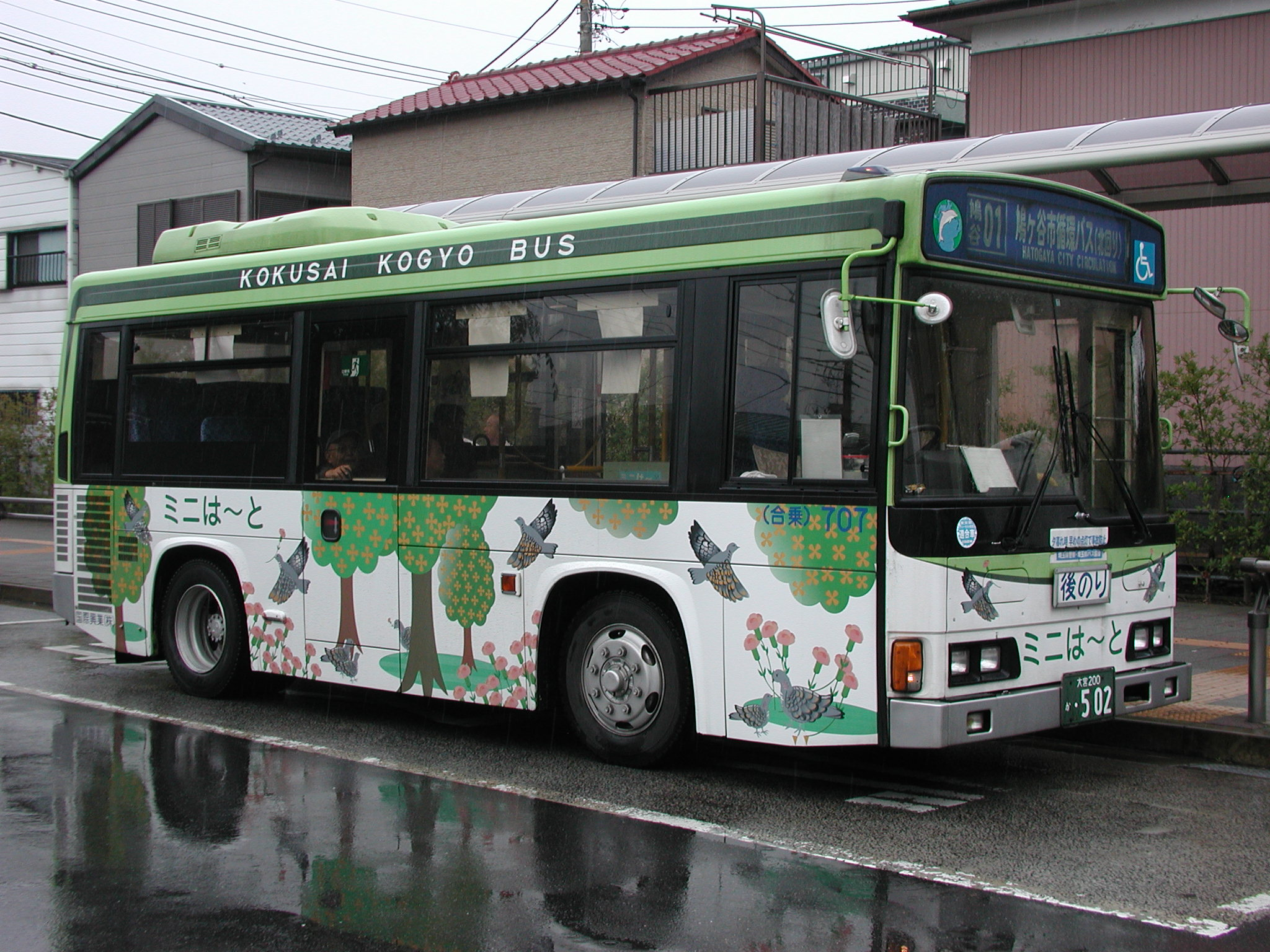 「鳩ヶ谷市循環バス『ミニは〜と』」専用車両（日野・レインボーHR：KK-HR1JEEE/国際興業鳩ヶ谷営業所所属：社番・707） 鳩ヶ谷駅東口にて